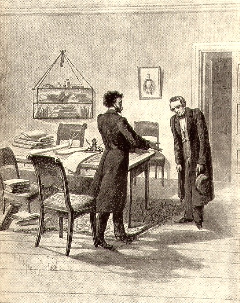 Рисунок П.Бореля "Кольцов у Пушкина"